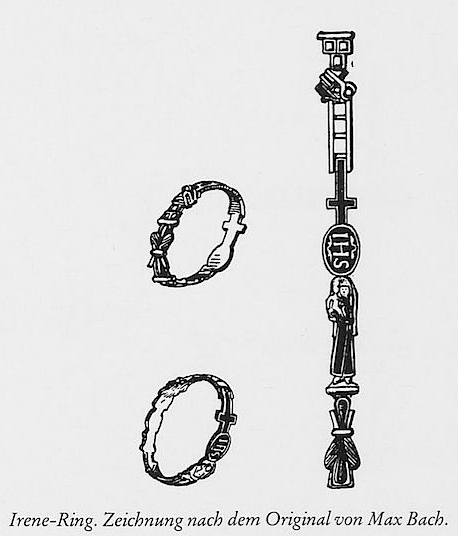 Angeblicher Ring der Königin Irene, in Wirklichkeit 2. H. 16. Jh.